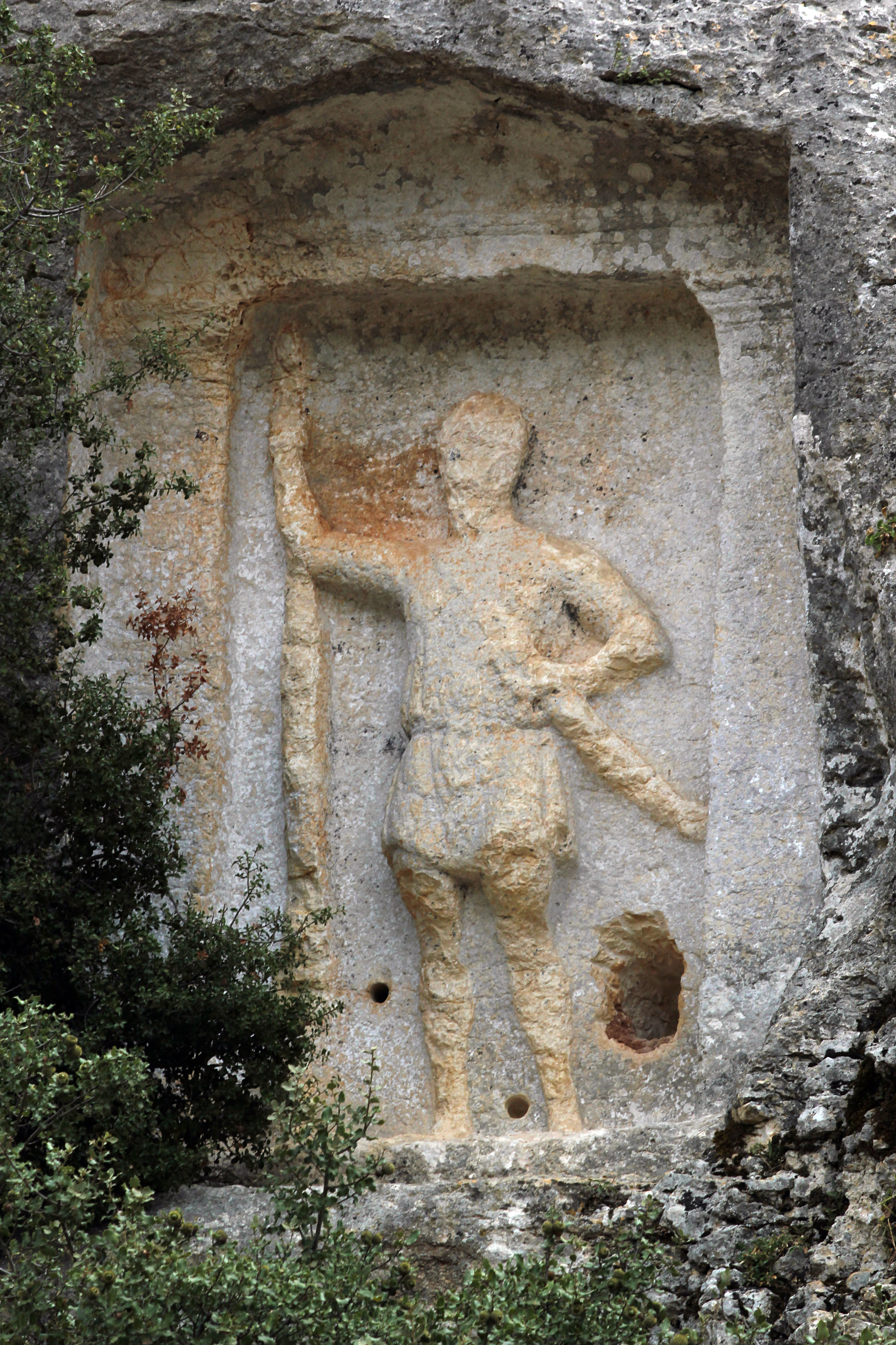 Relief eines Kriegers bei Efrenk, nahe Kızkalesi, Landkreis Erdemli, Südtürkei